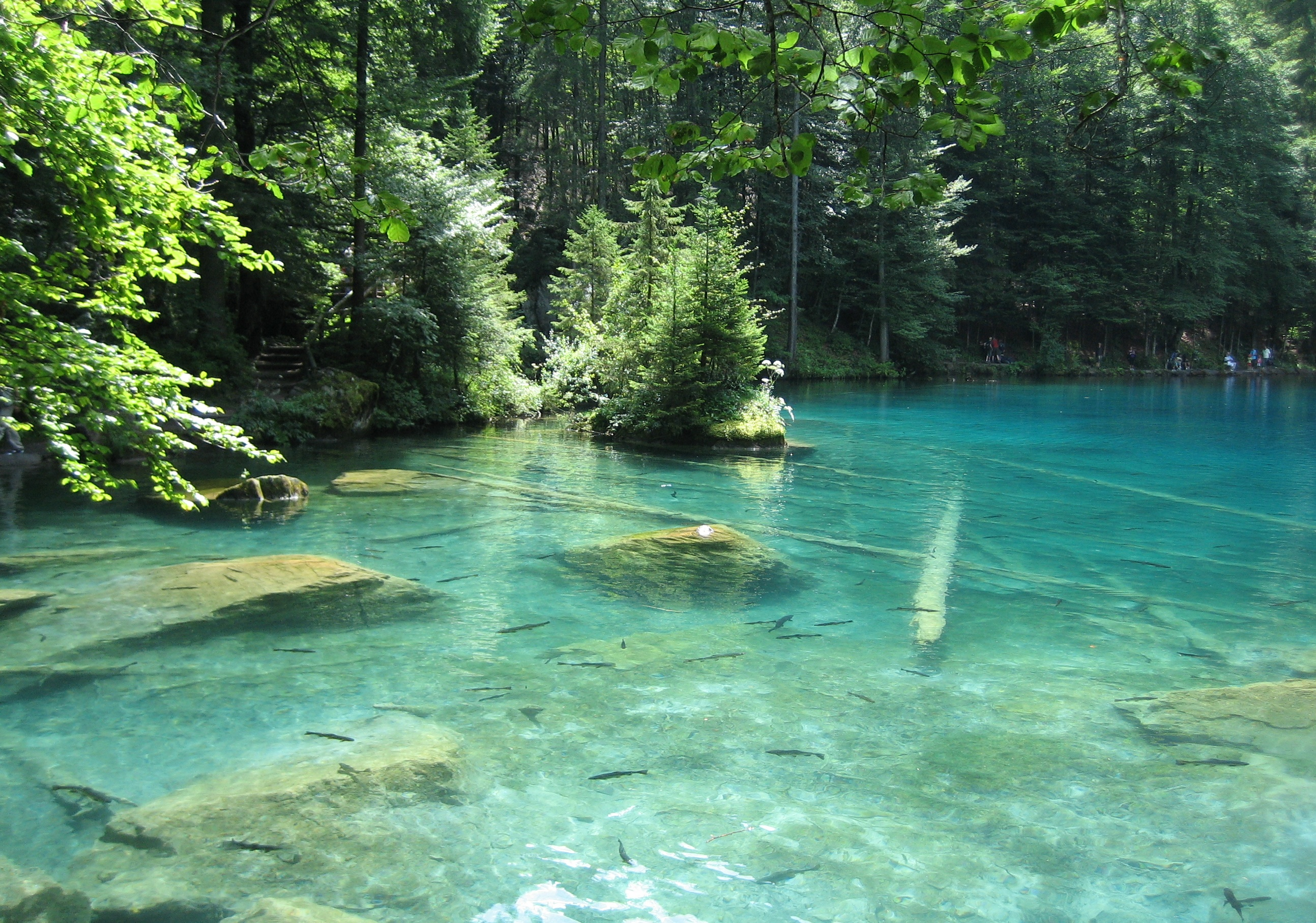 Blausee im Berner Oberland